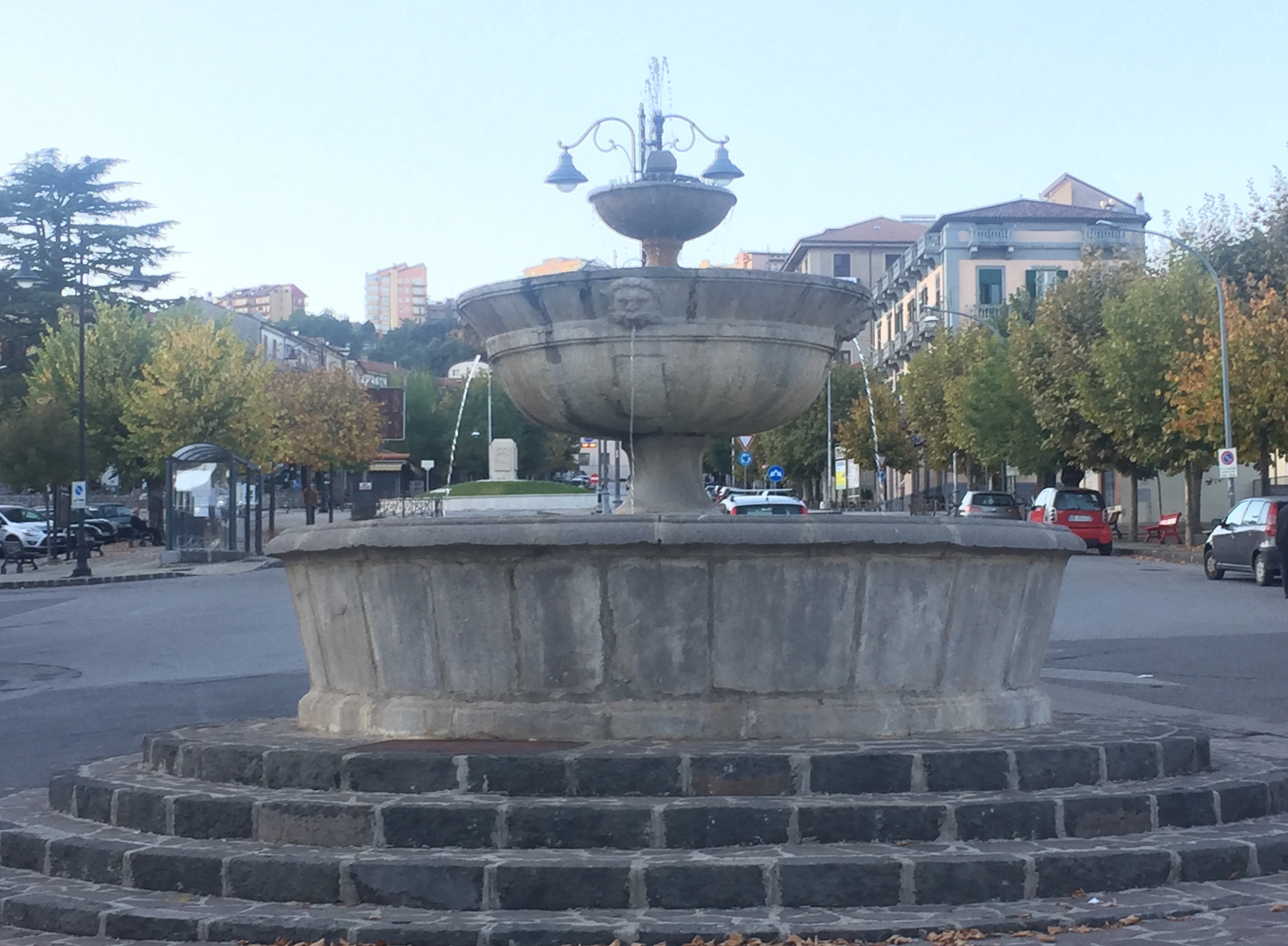 Fontana Monumentate G.Murat